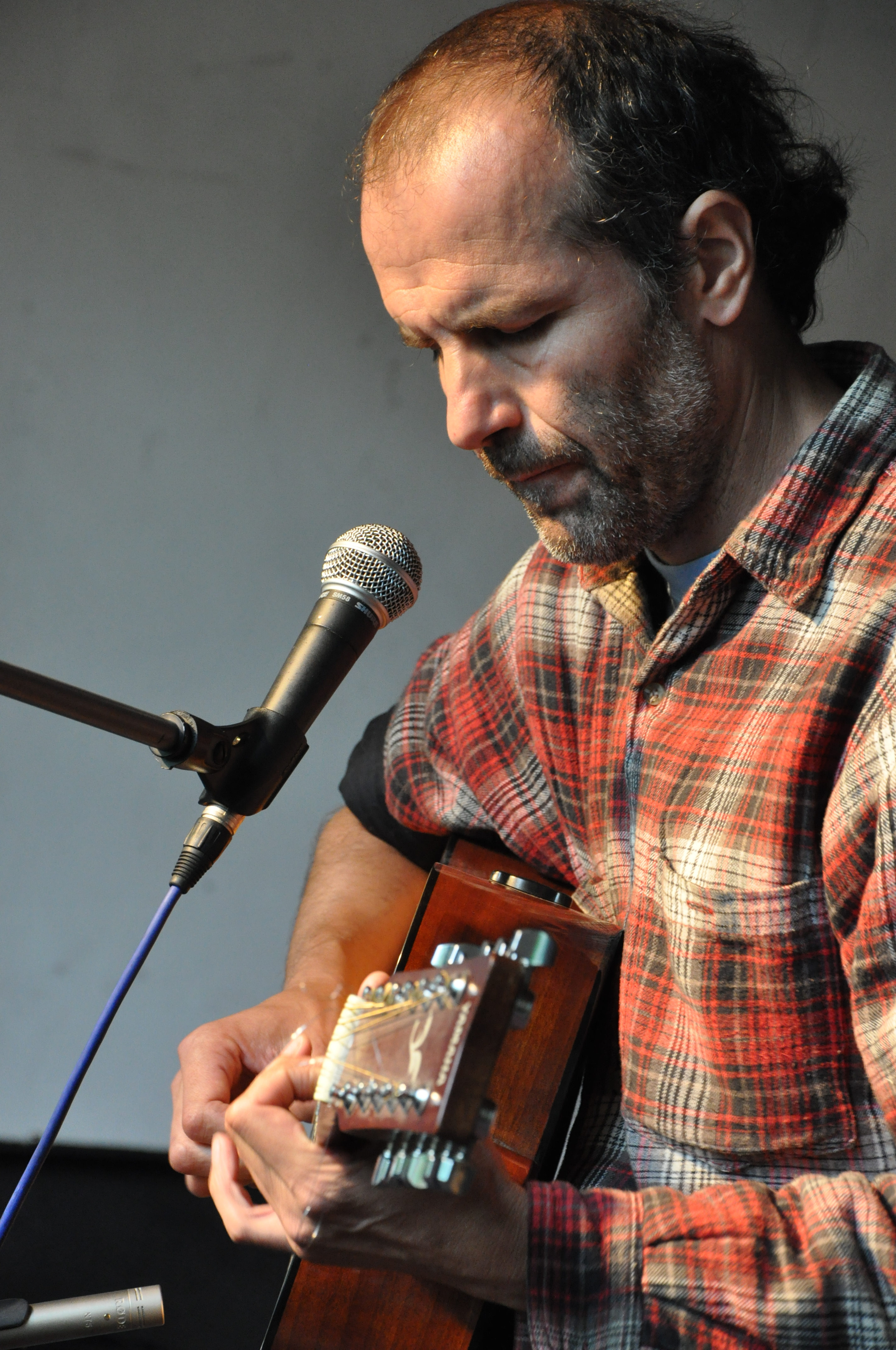 Karel Vepřek na festivalu Otevřeno Jimramov 2009